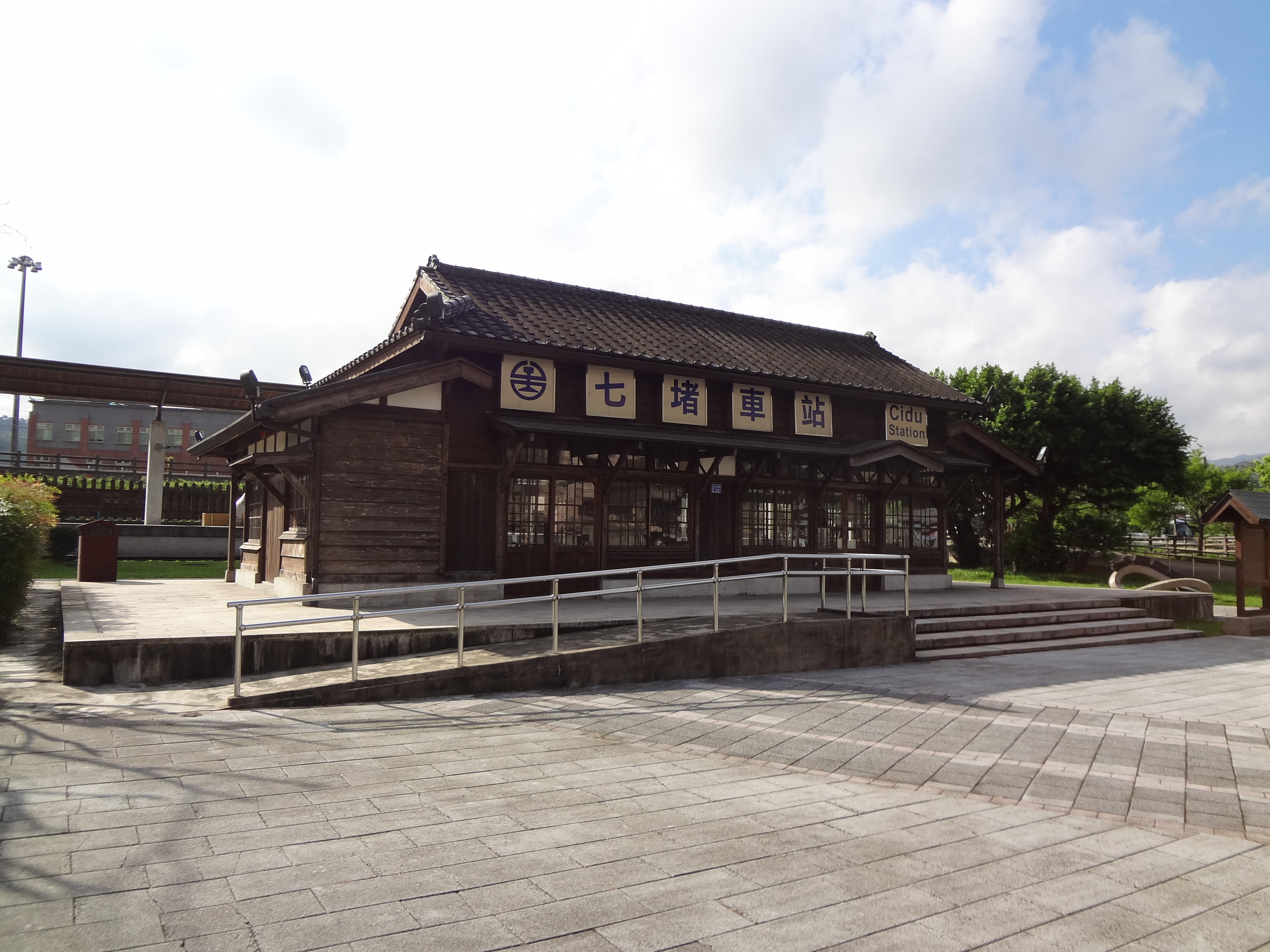 原臺灣鐵路管理局七堵前站，位於基隆市七堵區光明路23號。